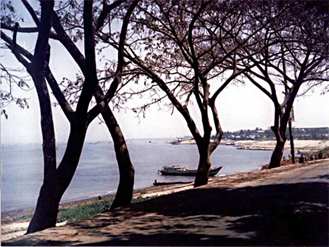 Munsiganj Sadar Upazila, Dhaleshwari River, in Bangladesh